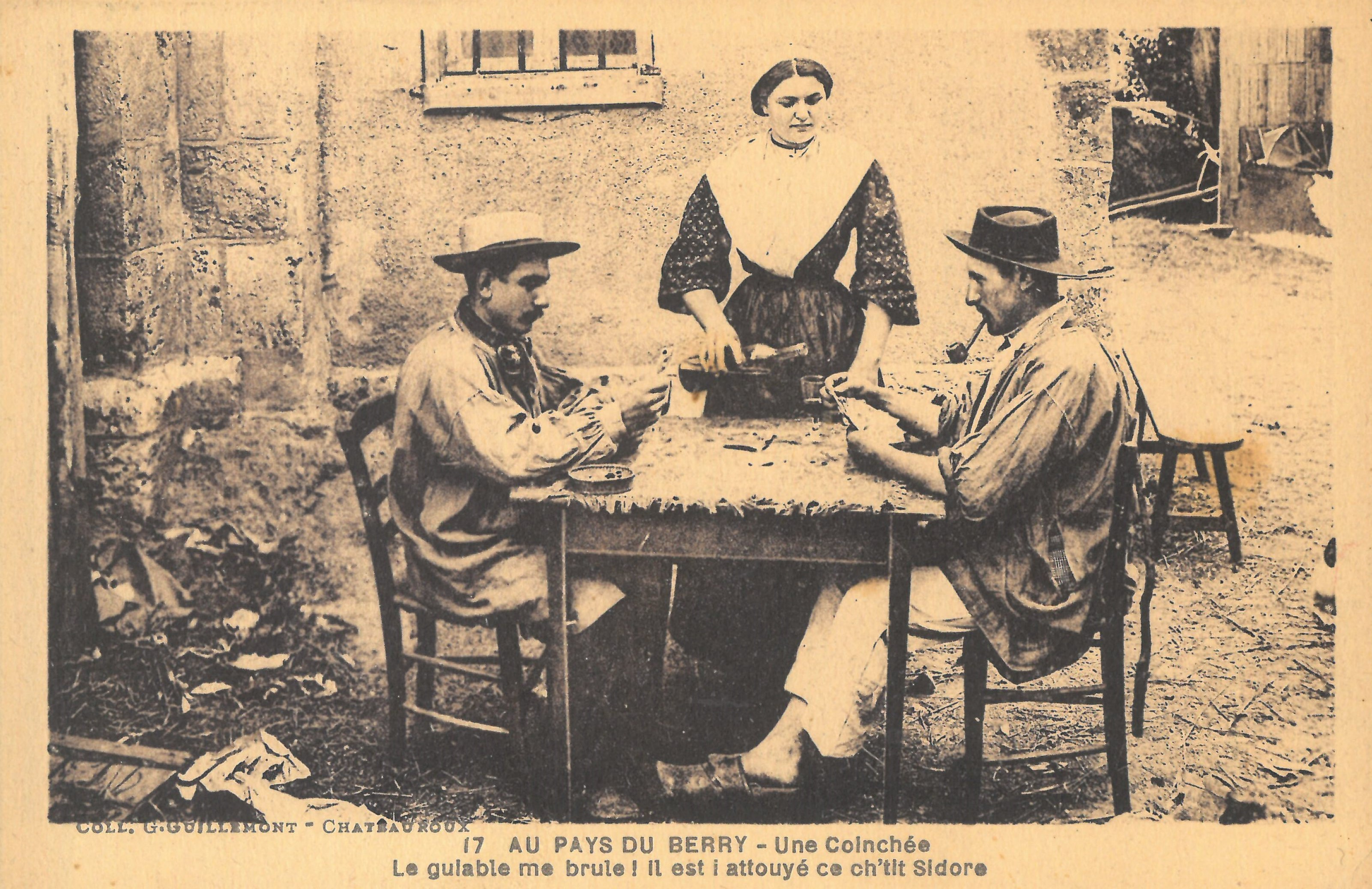 Au Pays du Berry : Une coinchée. Carte postale ancienne, Coll. G. Guillemont, Chateauroux.